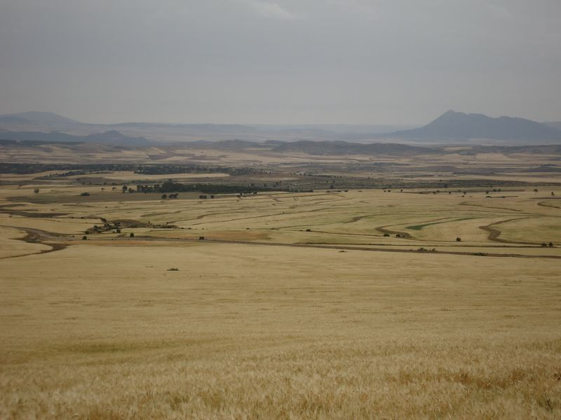 Champs de blés dans la région de Sakiet Sidi Youssef en Tunisie